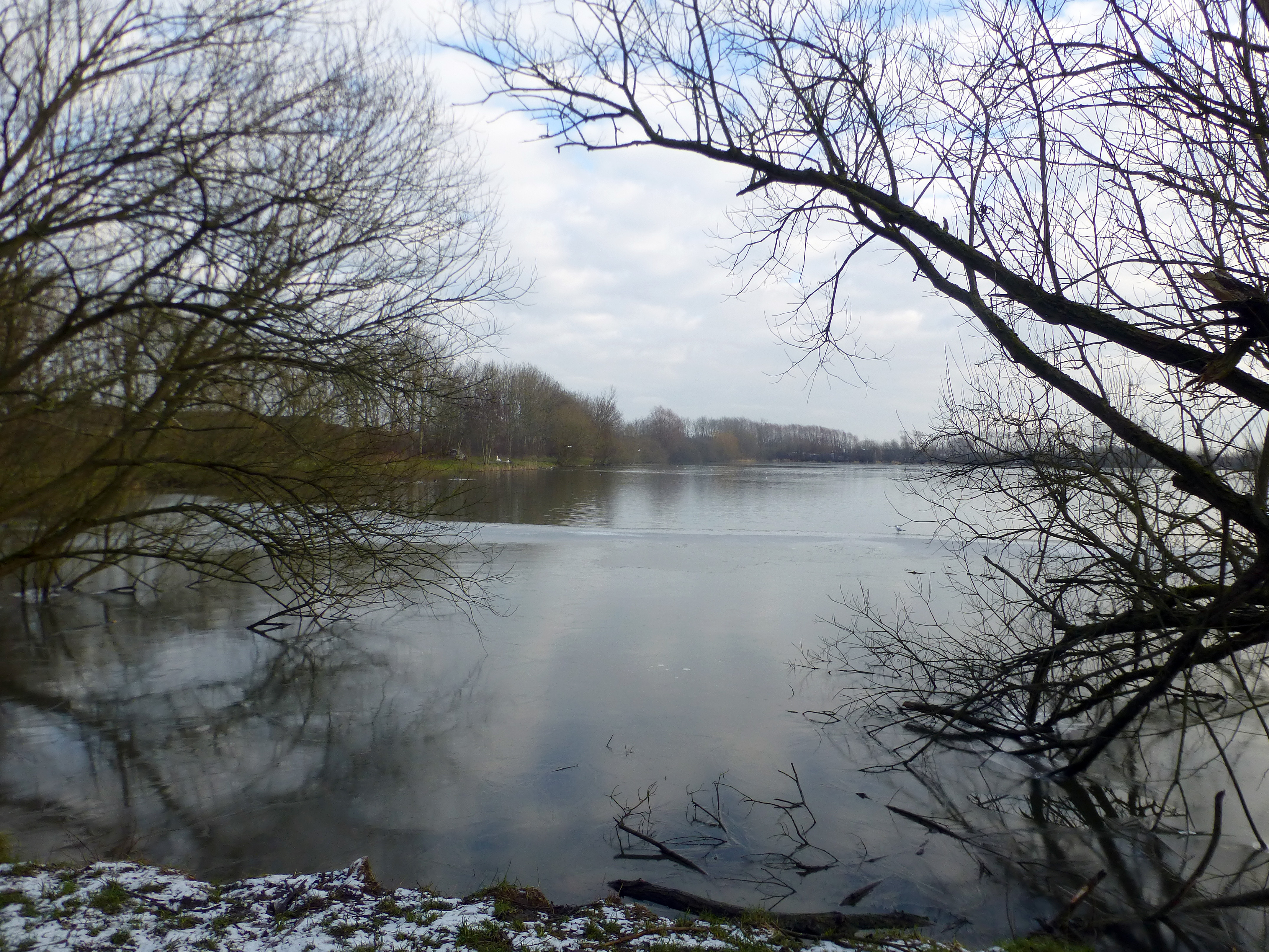 Tranbjerg sø set fra vest